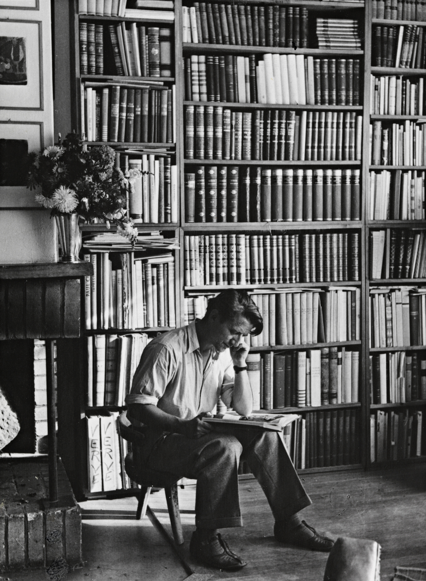 Tittel / Title: Portrett av forfatter Thorbjørn Egner (1912-1990) i sitt bibliotek Beskrivelse / Description: Bibliofilklubben, forening av bokvenner, stiftet i Oslo 13. mars 1922 med det formål å virke for fremme av bibliofili, bokhistorie og interessen for vakre bøker samt være et bindeledd mellom norske bokvenner. Medlemstallet er begrenset til 33. Dato / Date: sommeren 1947 Fotograf / Photographer: ukjent / unknown Eier / Owner Institution: Nasjonalbiblioteket / National Library of Norway Lenke / Link: Bildesignatur / Image Number: blds_05790